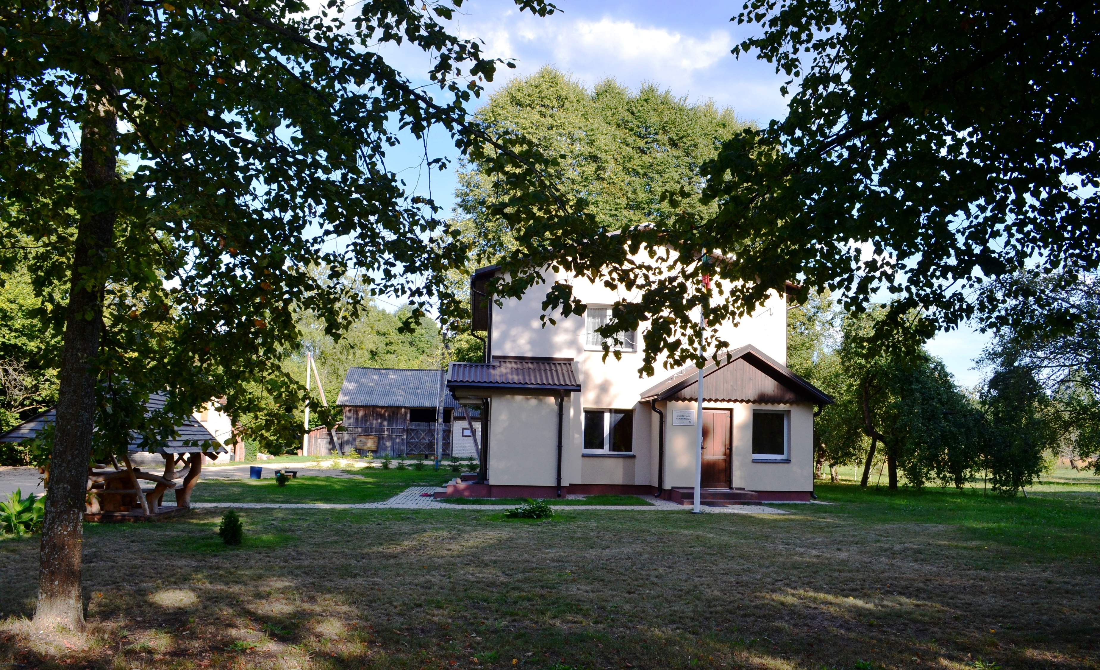 Musteikos girininkija, Musteika, Varėnos r.